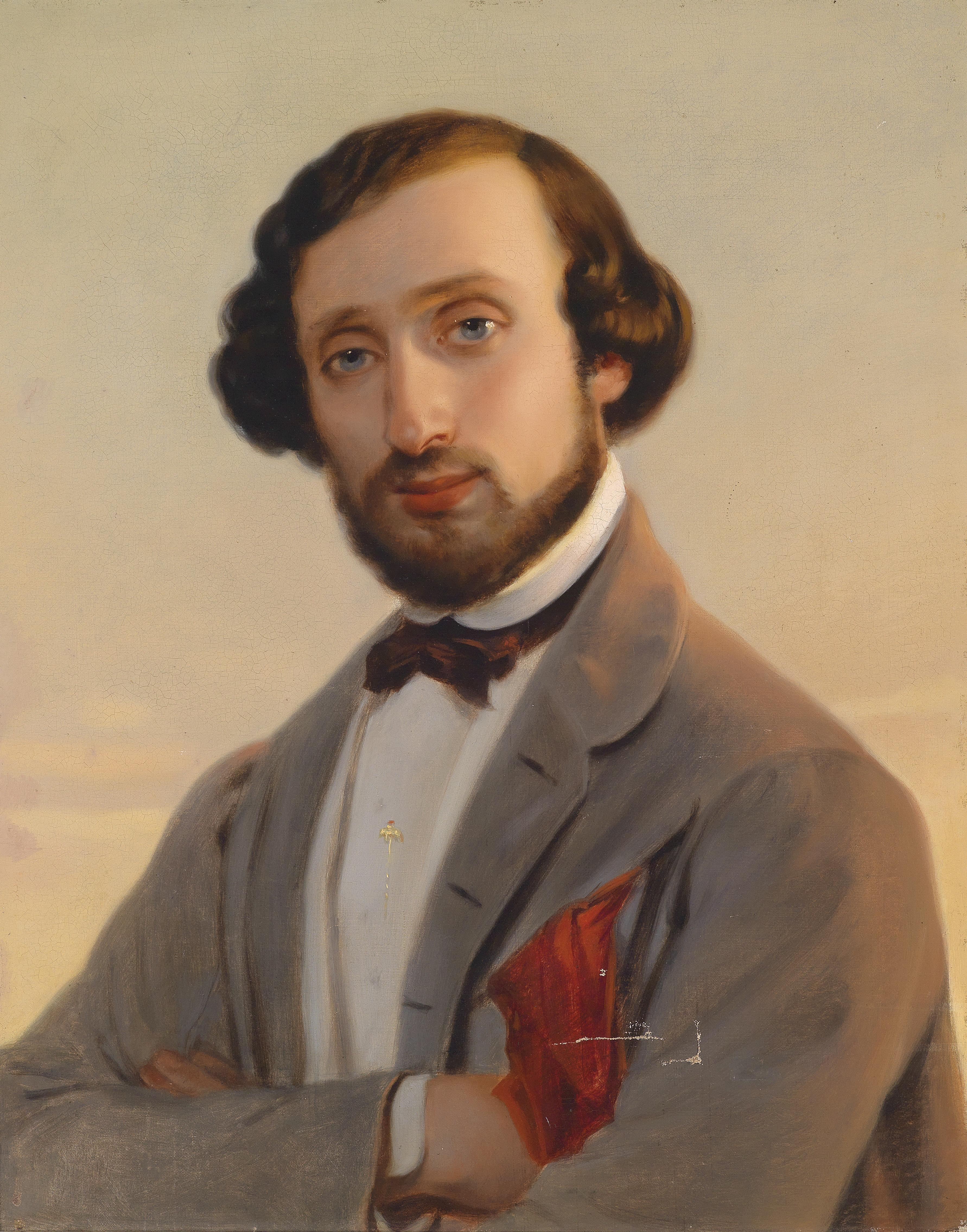 Bildnis Ludwig August Frankl von Hochwart (1810-1894)